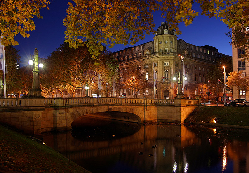 Der Kö-Graben in der Mitte der Königsallee in Düsseldorf